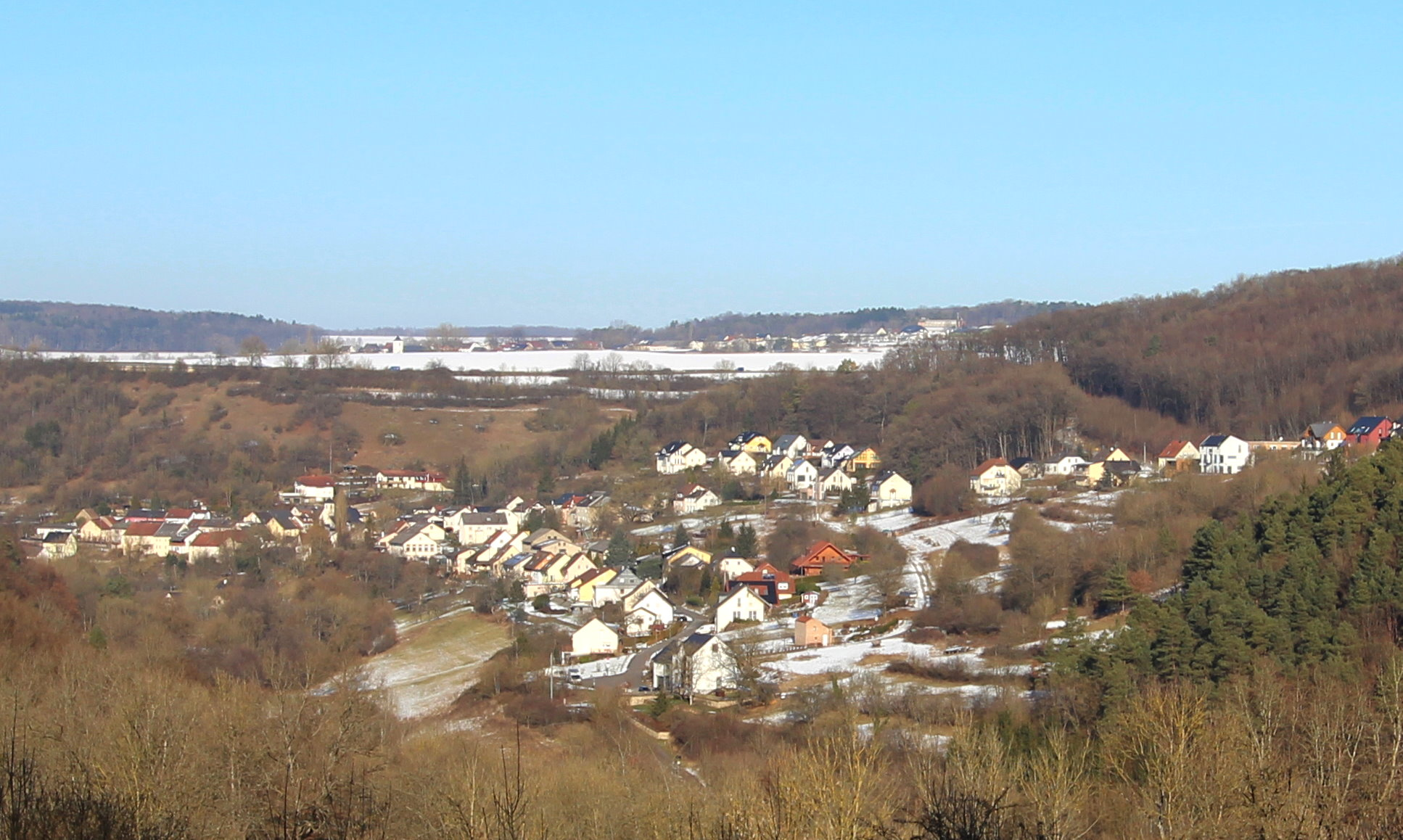 54636 Hüttingen an der Kyll. Panoramabild von 2017.